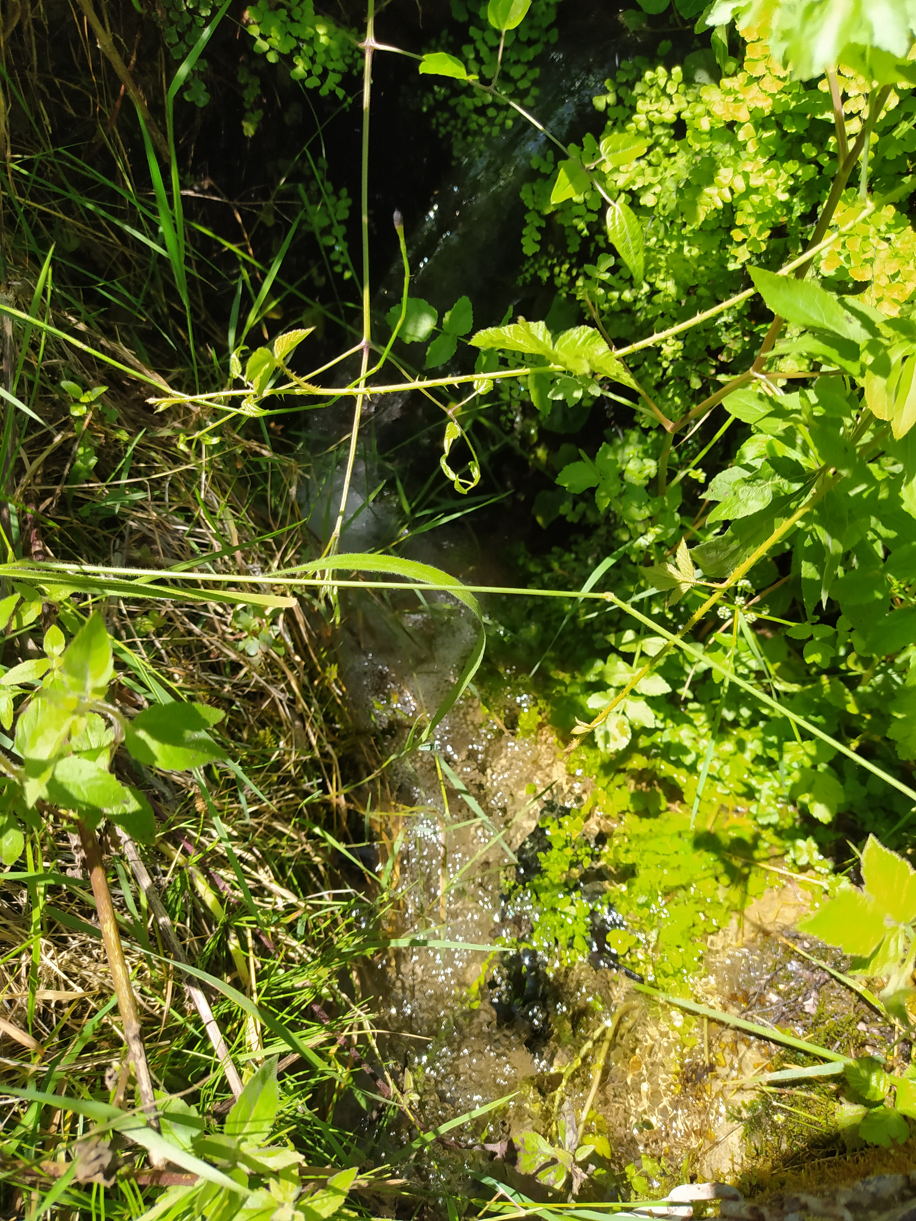 L'aigua rajant a la Font de Fontelles